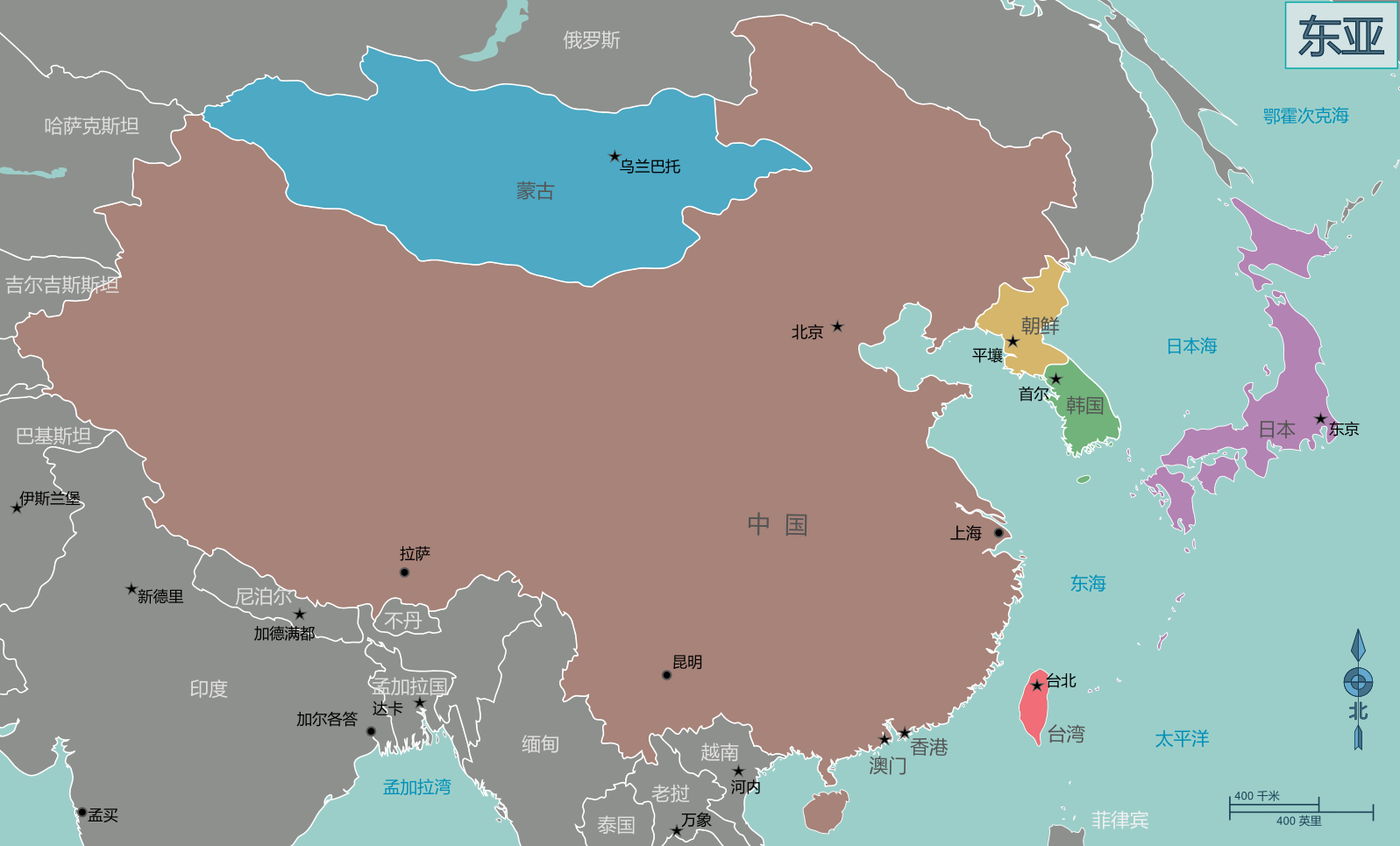 适用于维基导游的东亚概图。